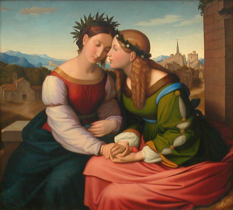 Ce surnom avait été donné par les Italiens, par dérision, aux jeunes artistes allemands installés, dès 1810, à